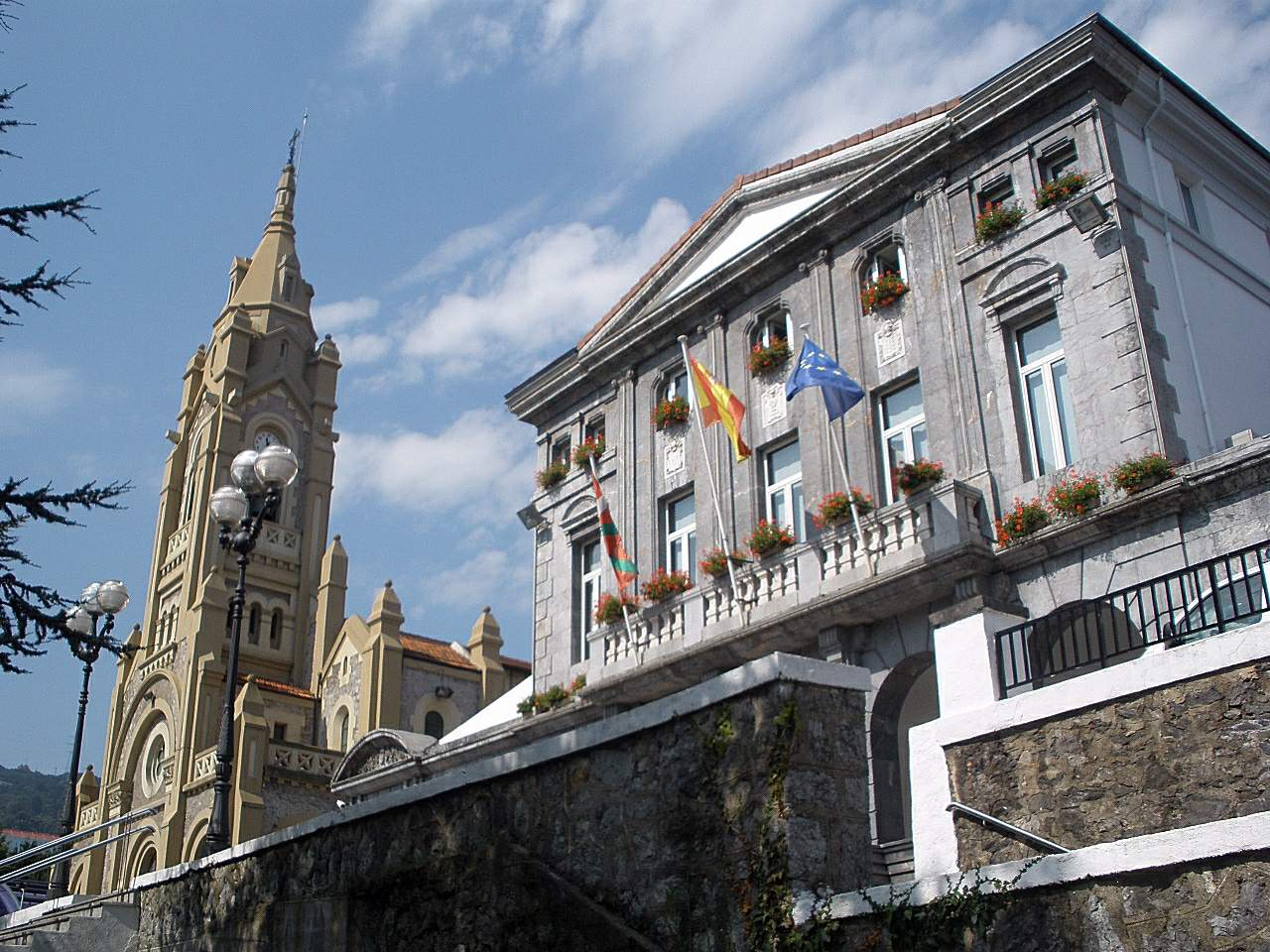 Ayuntamiento de Trapagaran (Bizkaia)